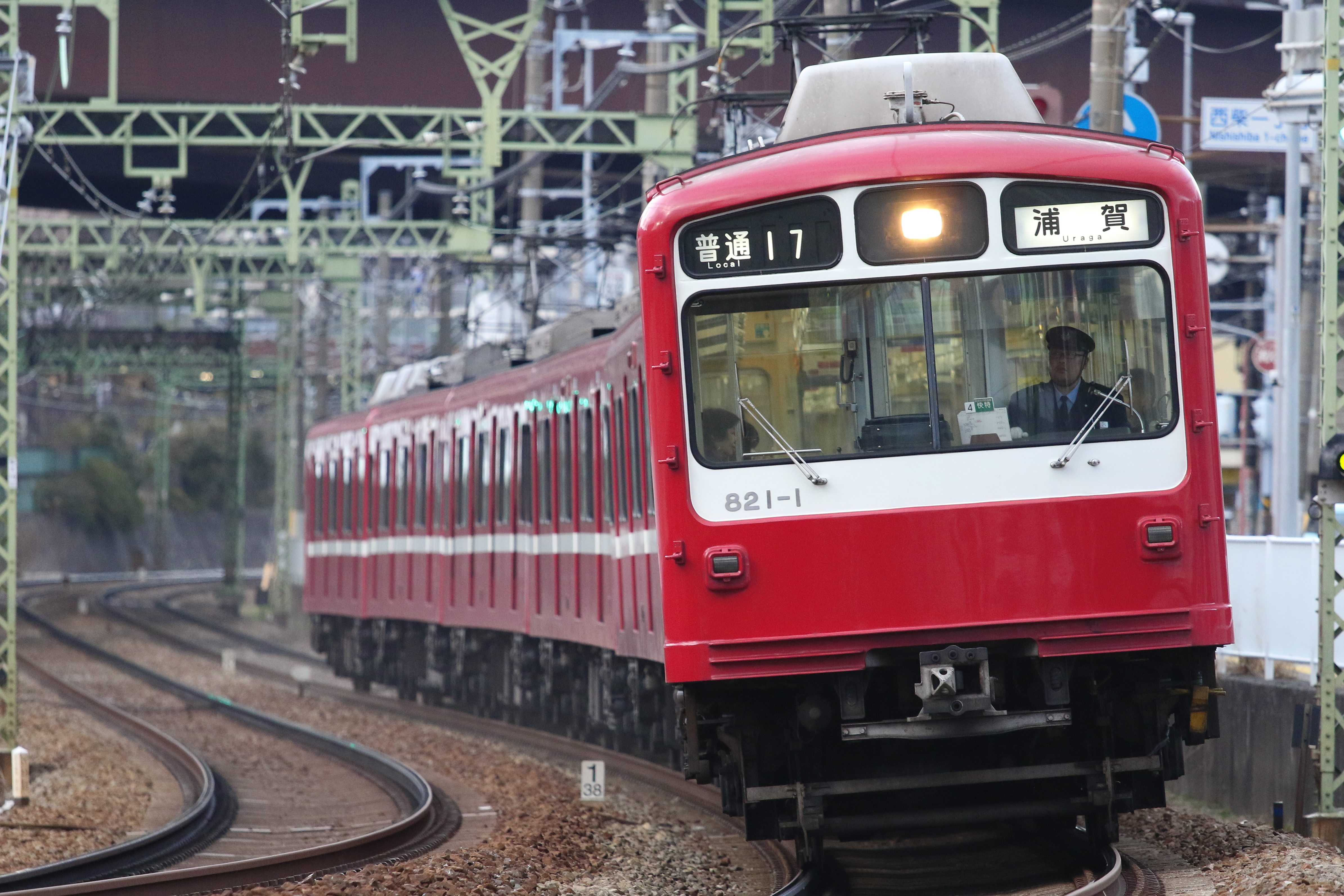 ダルマさん。